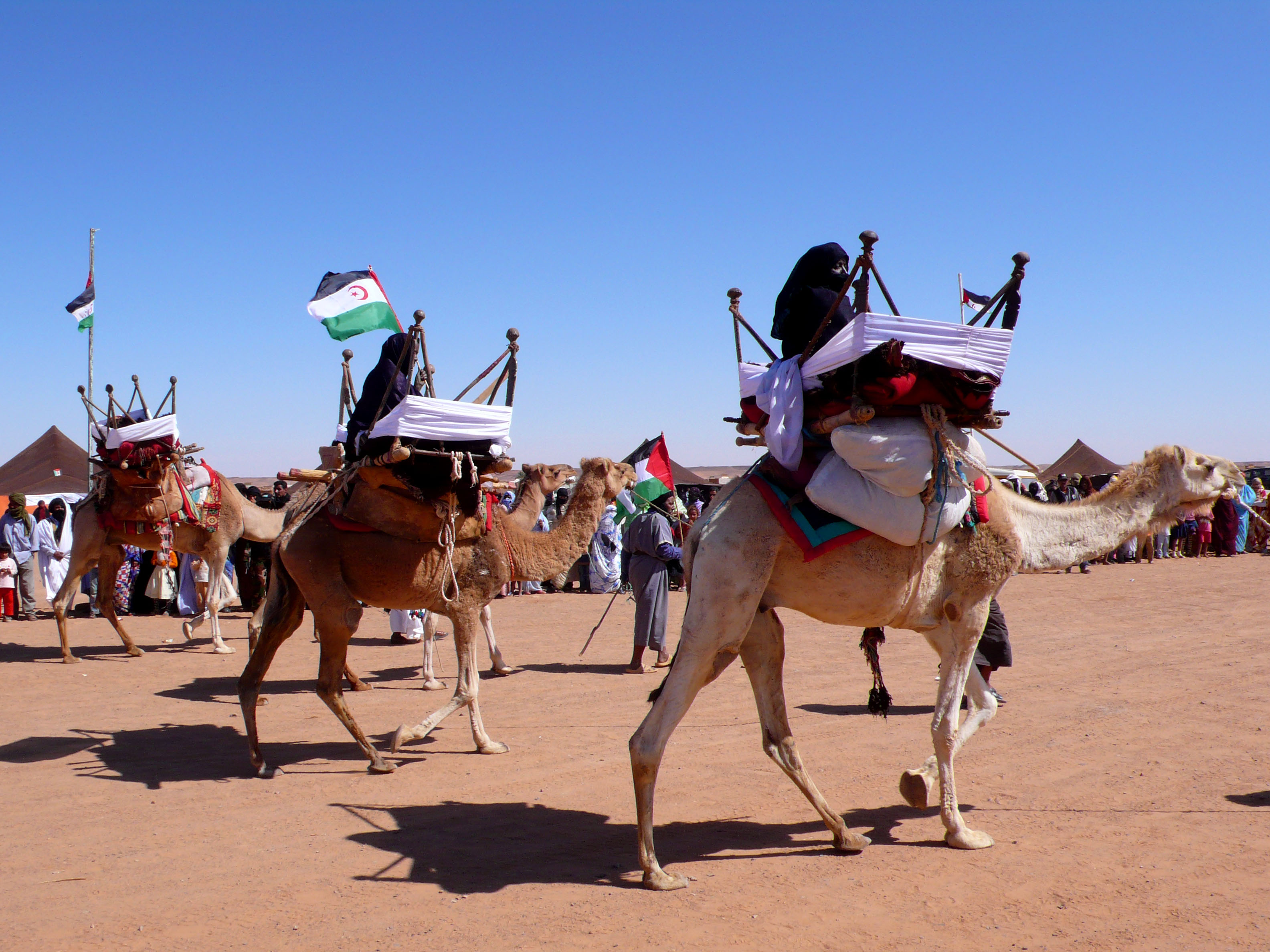 Exhibición de camellos en la wilaya de Dajla (campamentos de refugiados saharauis de Tinduf, abril de 2007)